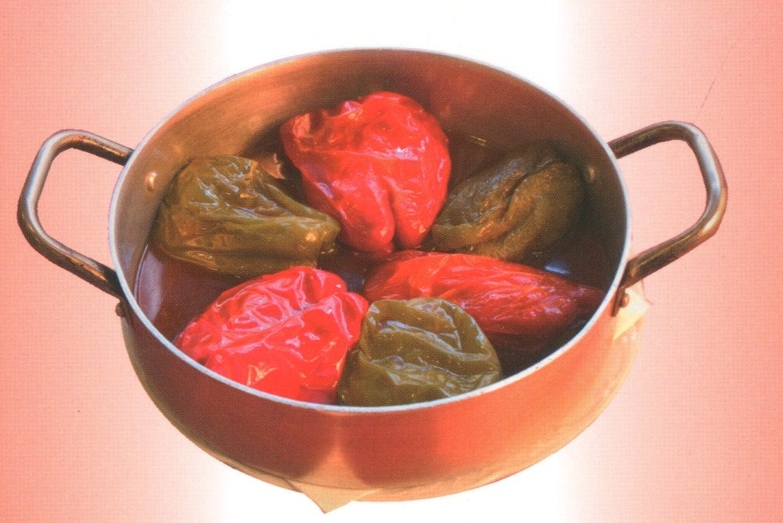 Pimientos rellenos